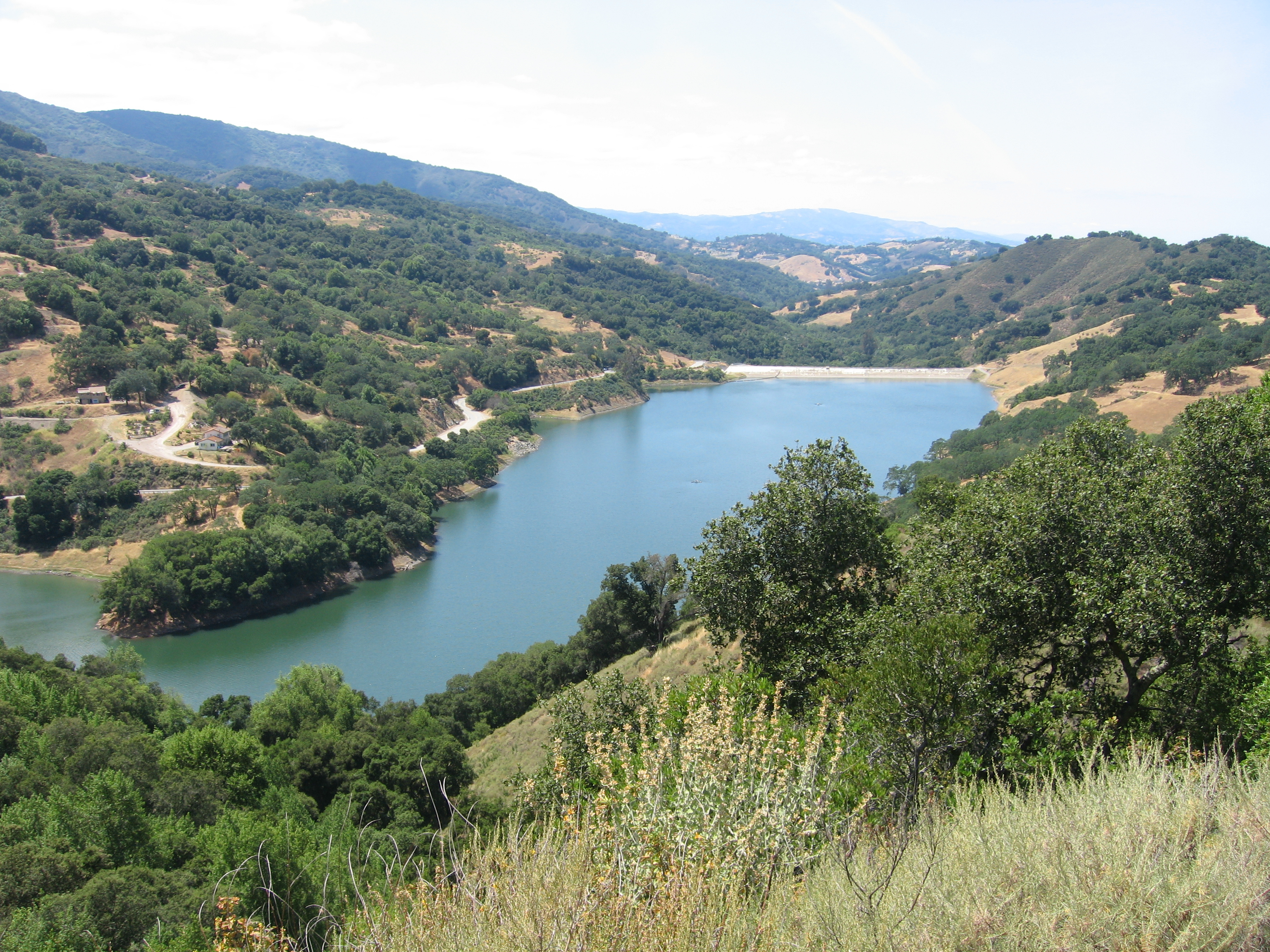 Guadalupe Reservoir, San Jose, CA